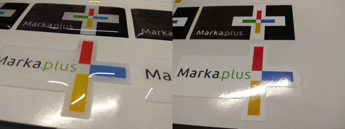 efekt rozmycia kolorów